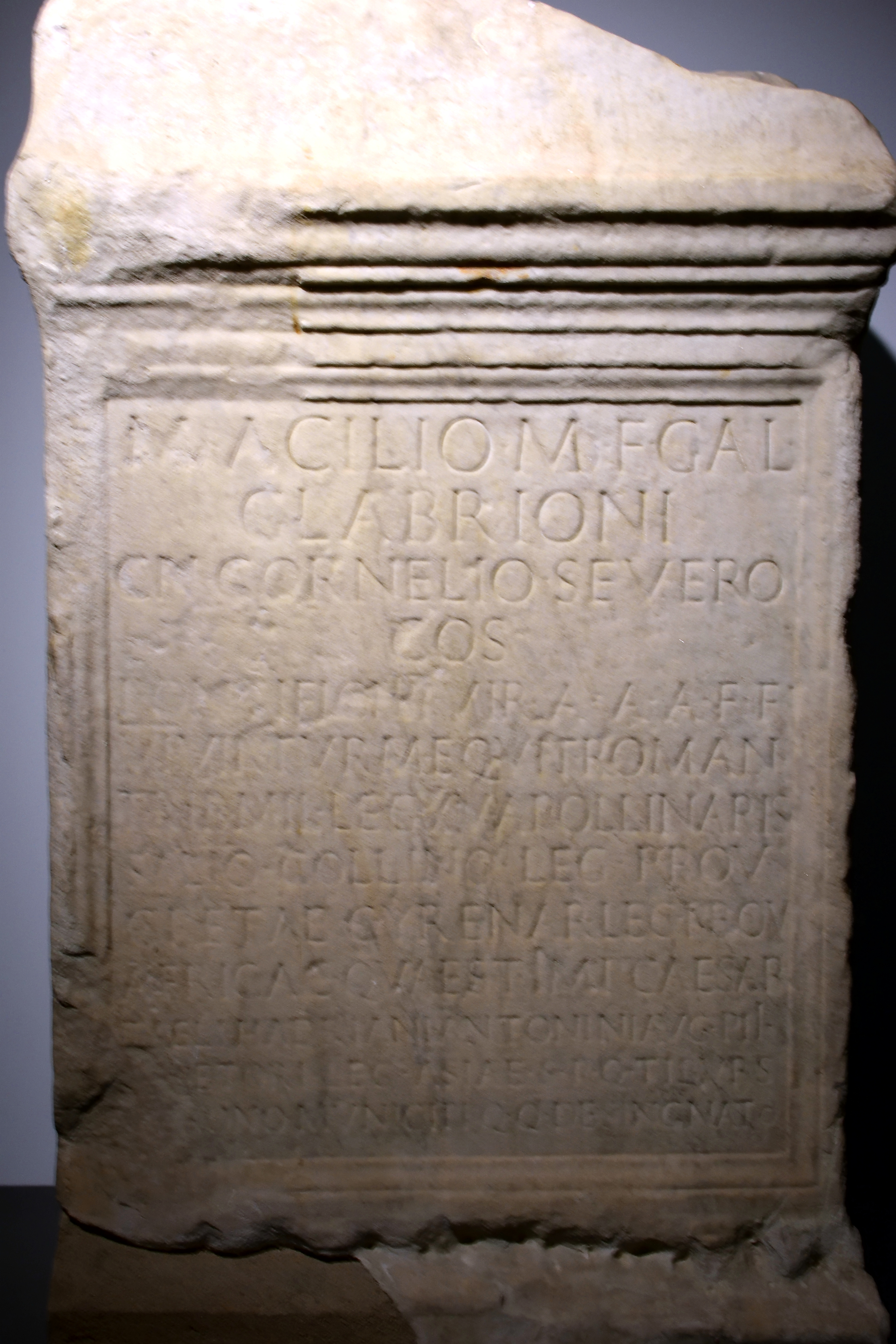 Erhaltene Statuenbasis des Manius Acilius Glabrio, die im Portikus, im Tempel des Hercules Victor (Tivoli) aufgestellt war. CIL XIV 4237 = EE IX, p 471 = InscrIt. 4-1, 98 = AE 1980, 189: M(anio) Acilio M(ani) f(ilio) Gal(eria) / Glabrioni / Cn(aeo) Cornelio Severo / co(n)s(uli) / pontifici IIIIvir(o) a(uro) a(rgento) a(ere) f(lando) f(eriundo) / VIvir(o) turm(arum) equit(um) Roman(orum) / trib(uno) mil(itum) leg(ionis) XV Apollinaris / salio Collino leg(ato) prov(inciae) / Cretae Cyrenar(um) leg(ato) prov(inciae) / Africae quaest(ori) Imp(eratoris) Caesar(is) / T(iti) Aeli Hadriani Antonini Aug(usti) Pii / [pr]aetori leg(ato) Asiae s(enatus) p(opulus)q(ue) Tiburs / [pat]rono municipi(i) q(uin)q(uennali) desi{n}gnato